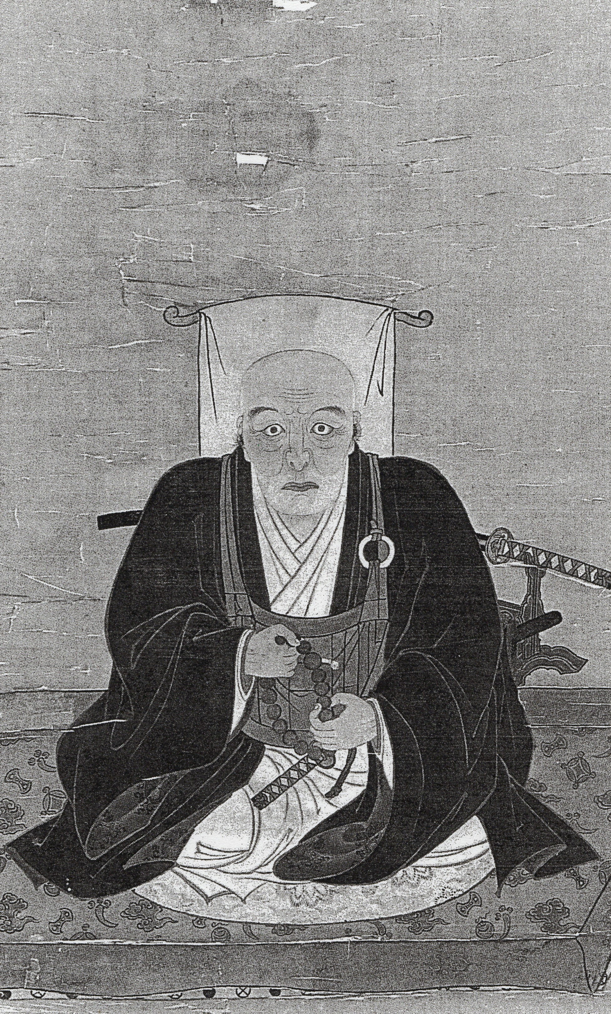 鍋島直之の肖像(モノクロ)。